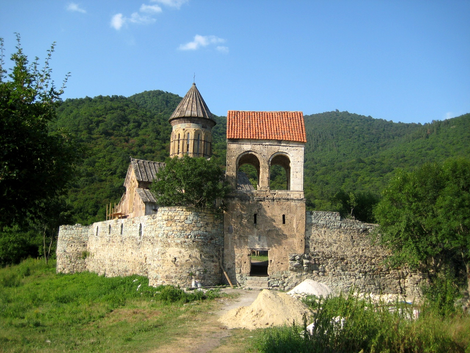 ფიტარეთი, ღვთისმშობლის სახელობის მე–12 საუკუნის ტაძარი